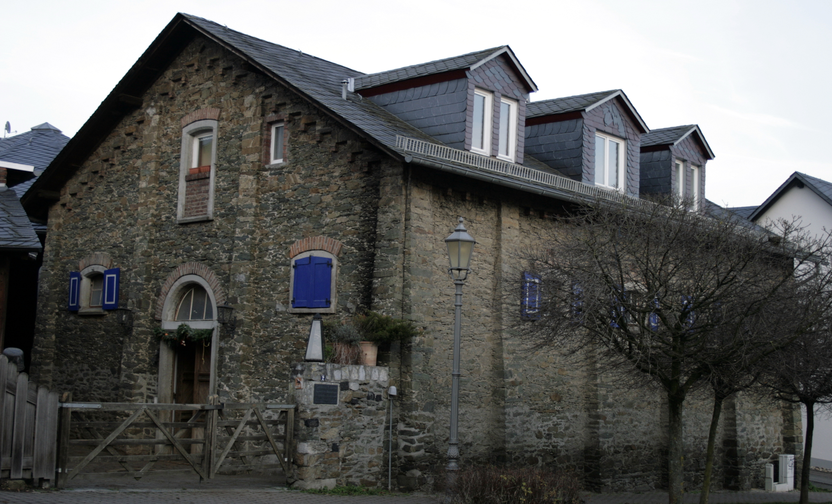 Ehemaliges fürstliches Gestüt in Hadamar, Deutschland